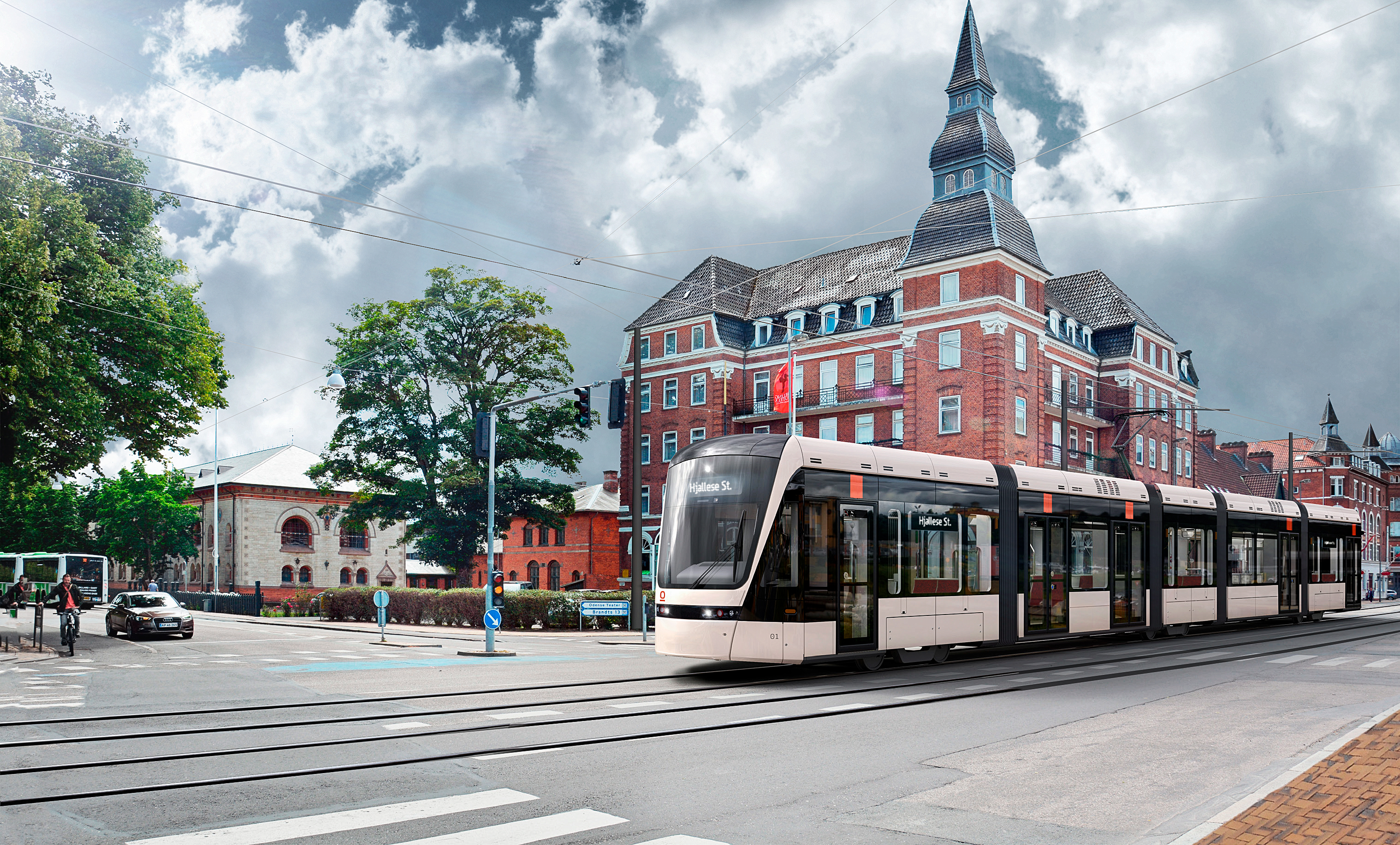 Visualisering af letbanevogn fra Østre Stationsvej